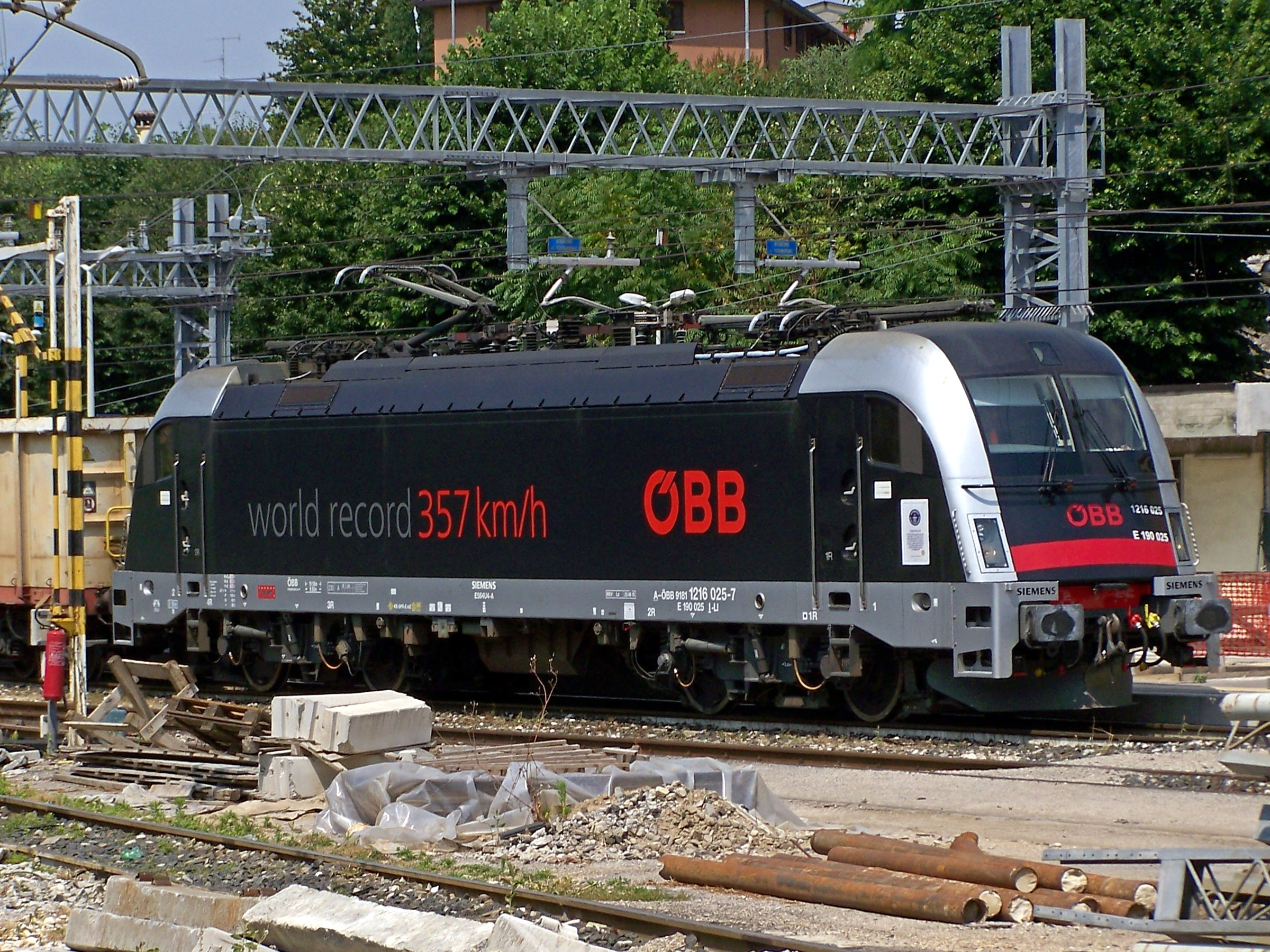 La E.190.025 di Rail Cargo Italia - ex Linea - in testa ad un treno merci presso il terzo binario della stazione di Lonato, in attesa di ripartire in direzione di Desenzano del Garda-Sirmione.